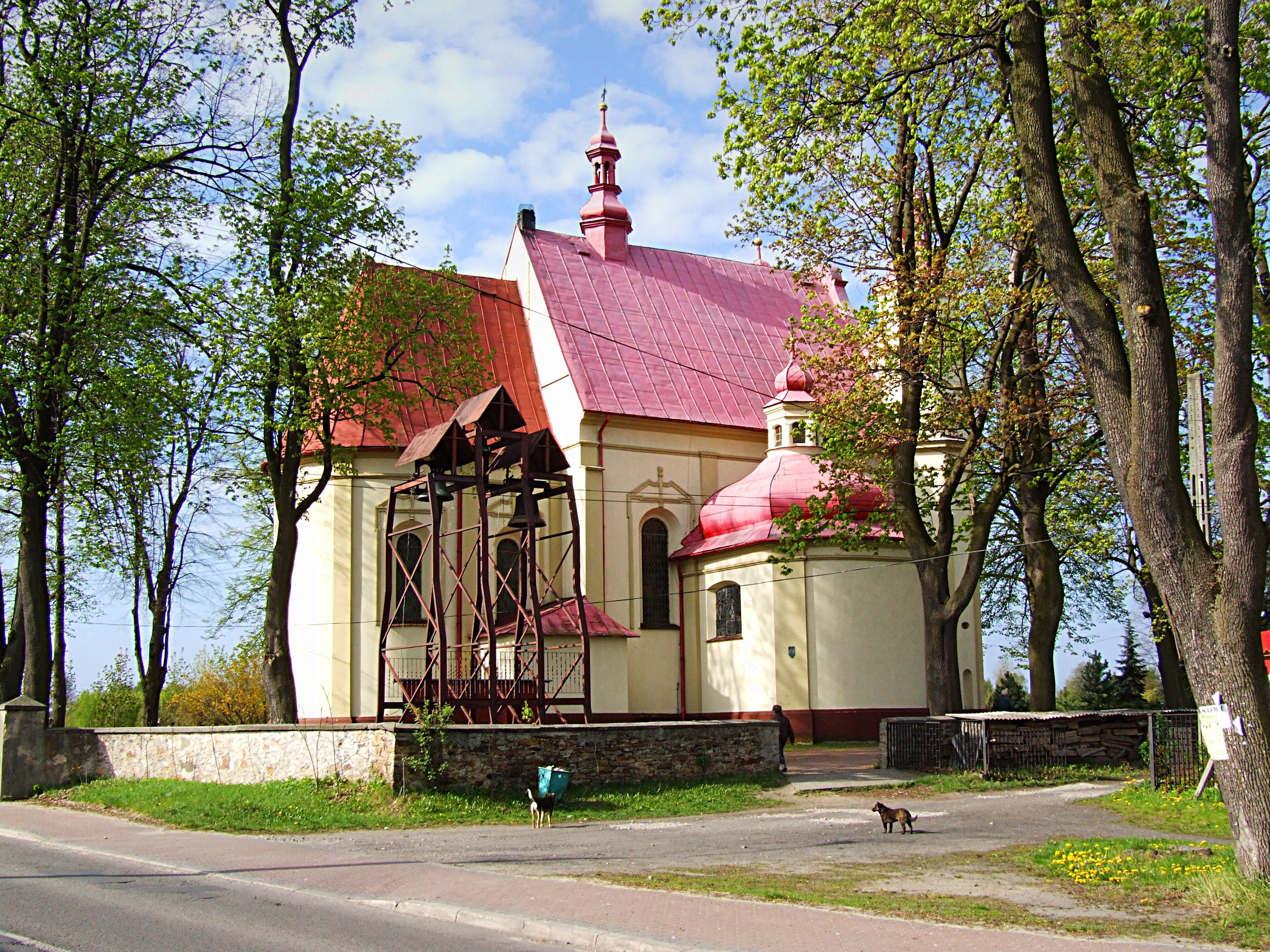 Skarżysko Kościelne - kościół pw. św. Trójcy